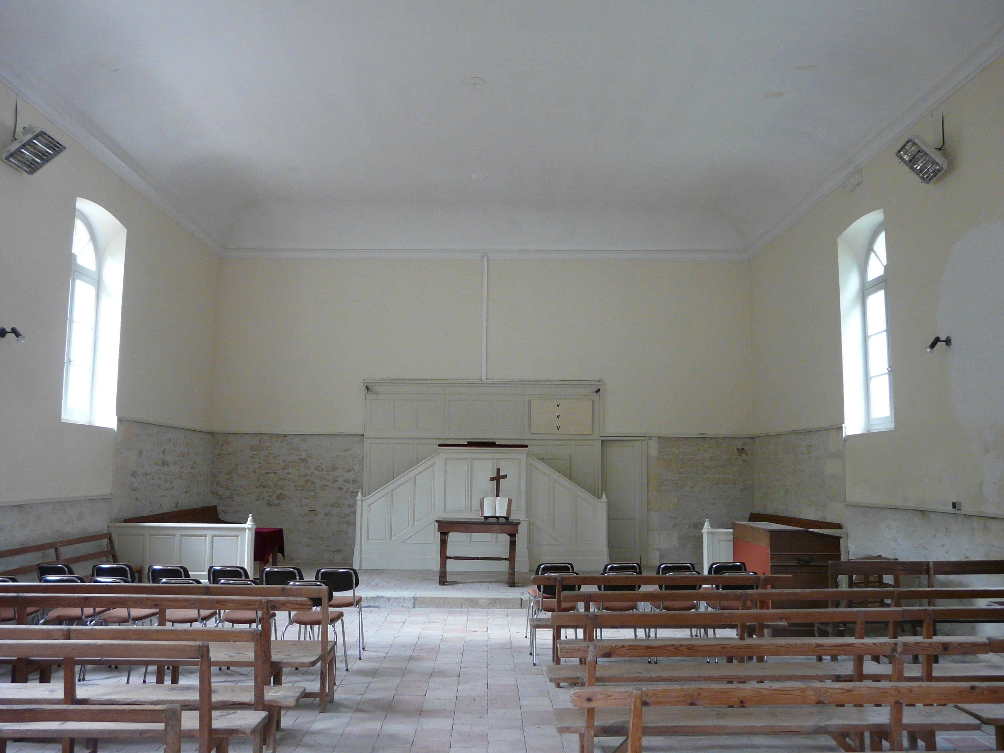 L'intérieur du temple protestant des Briands, Saint-Avit-Saint-Nazaire, Gironde, France.